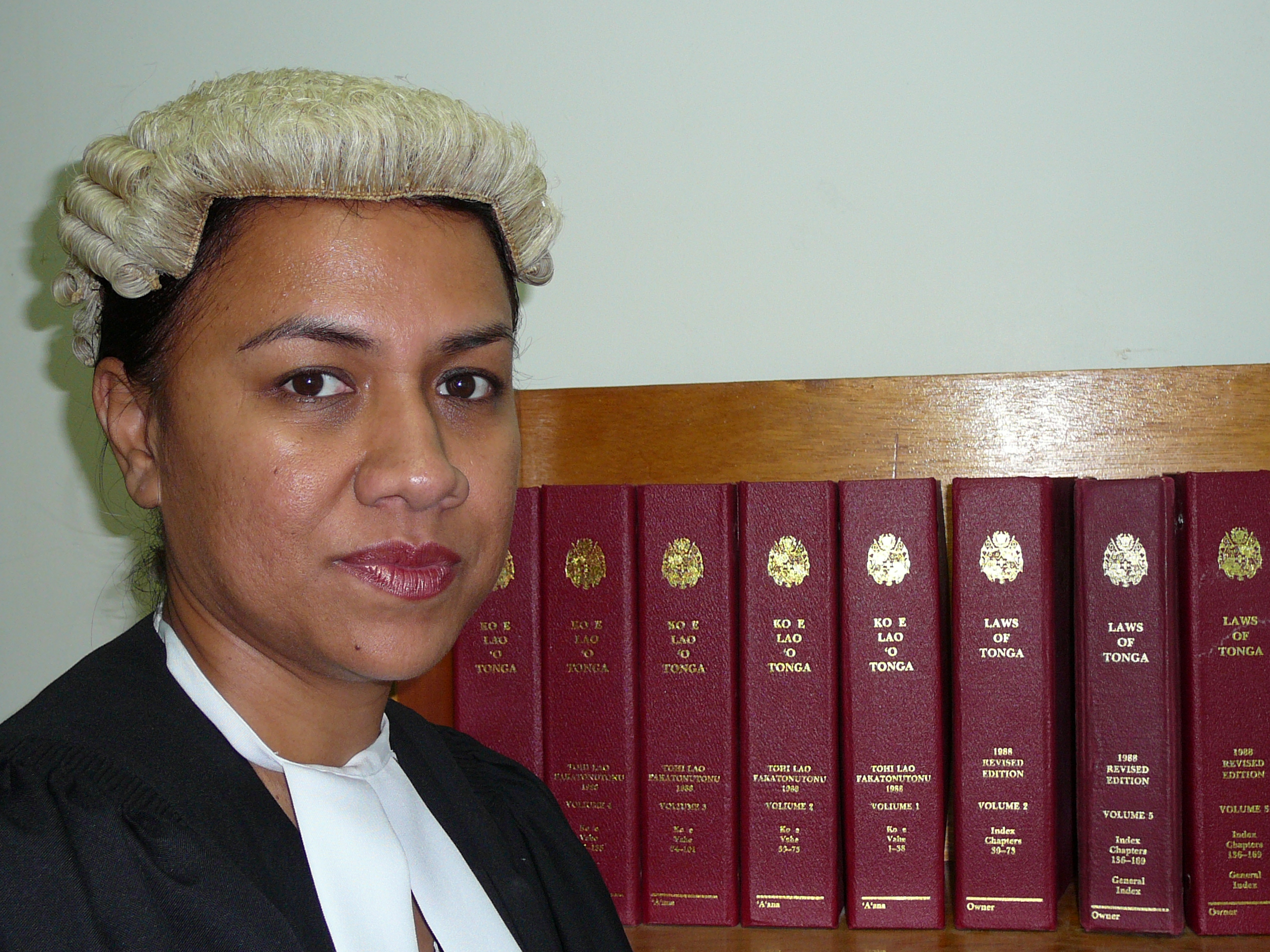 Tonga 2007. Photo: AusAID